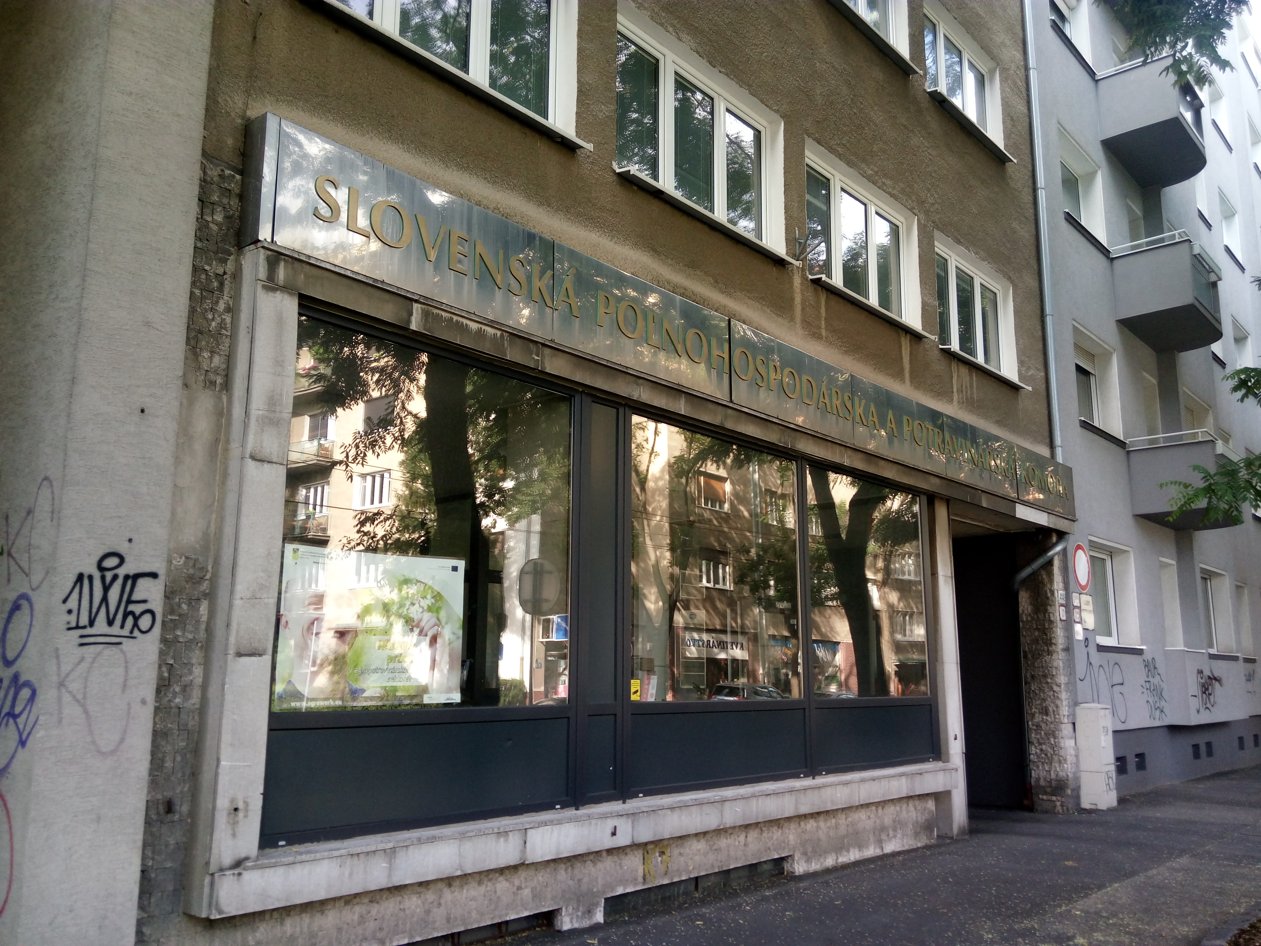 Záhradnícka 21, Staré Mesto, Bratislava